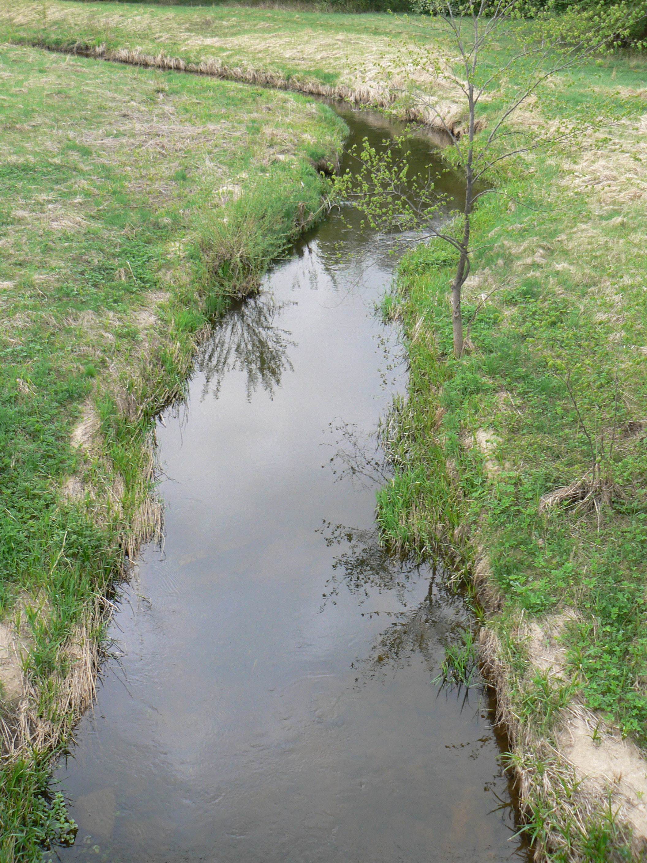 Aisė ve vsi Pėžaičiai. Pohled z mostu silnice č. 2202 proti proudu, t.j. k severu.